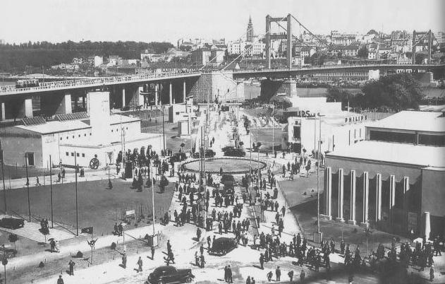 Београдски сајам је изграђен на основу одлуке Београдске општине 1936. године. Друштву за приређивање сајма и изложби је уступљен терен крај новоизграђеног Моста краља Александра. Прва фаза радова је започета у пролеће 1937. године, а завршена је до отварања, септембра 1937. Друга фаза, у којој су изграђени Турски и велики Немачки павиљон, завршена је 1938. Планирана је изградња и шестог југословенског павиљона, али су радови обустављени због избијања Другог светског рата. За време Другог светског рата га је Гестапо користио као концентрациони логор у ком је страдало око 48.000 људи.